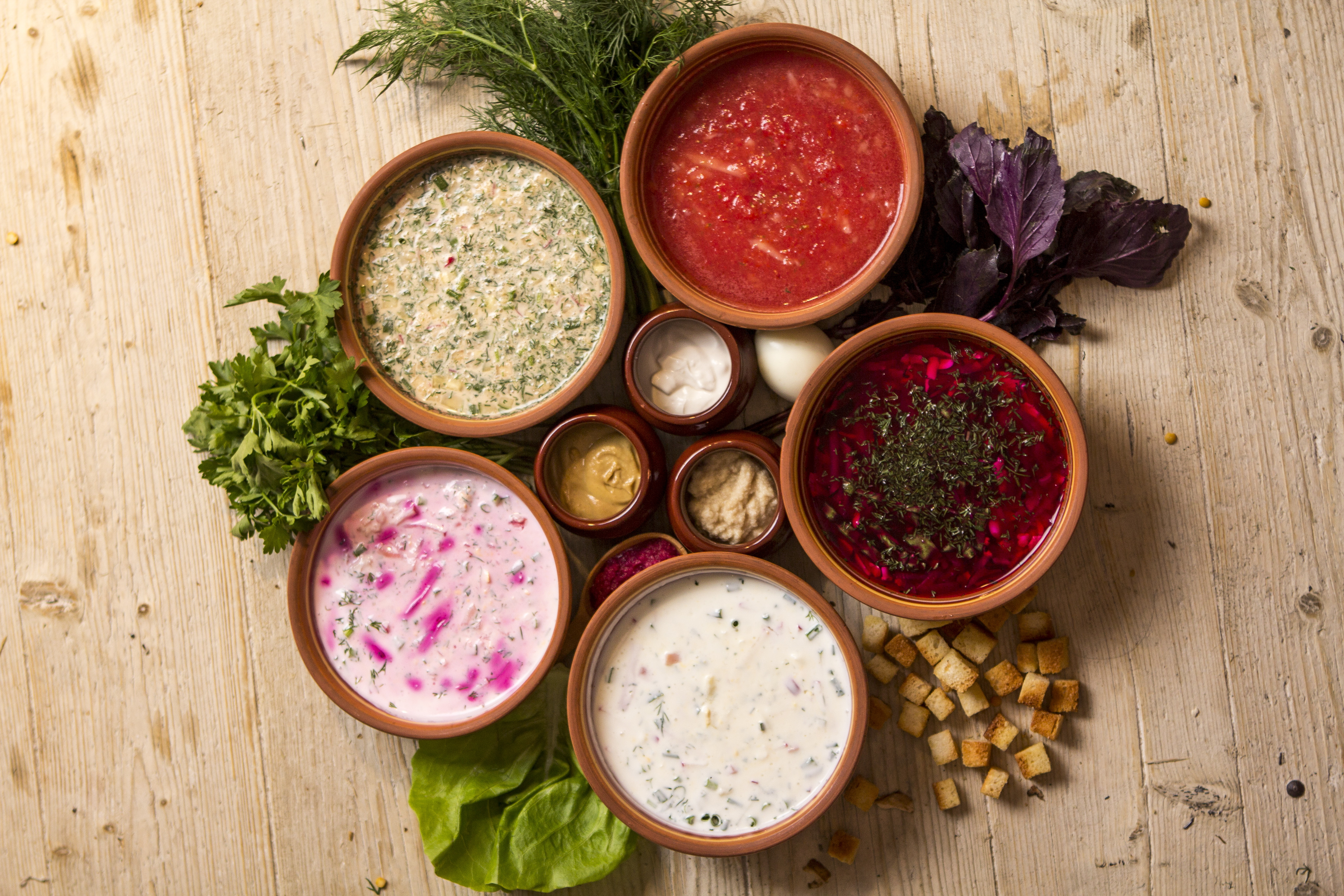 Украинская кухня Корчмы Тарас Бульба